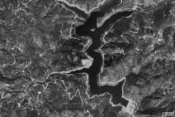 Satellite